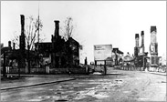 Pohjanhovi 1945 saksalaisten poltettua RovaniemenЭрзянь: Hotel Pohjanhovi 1945 after German troops burned down all Rovaniemi